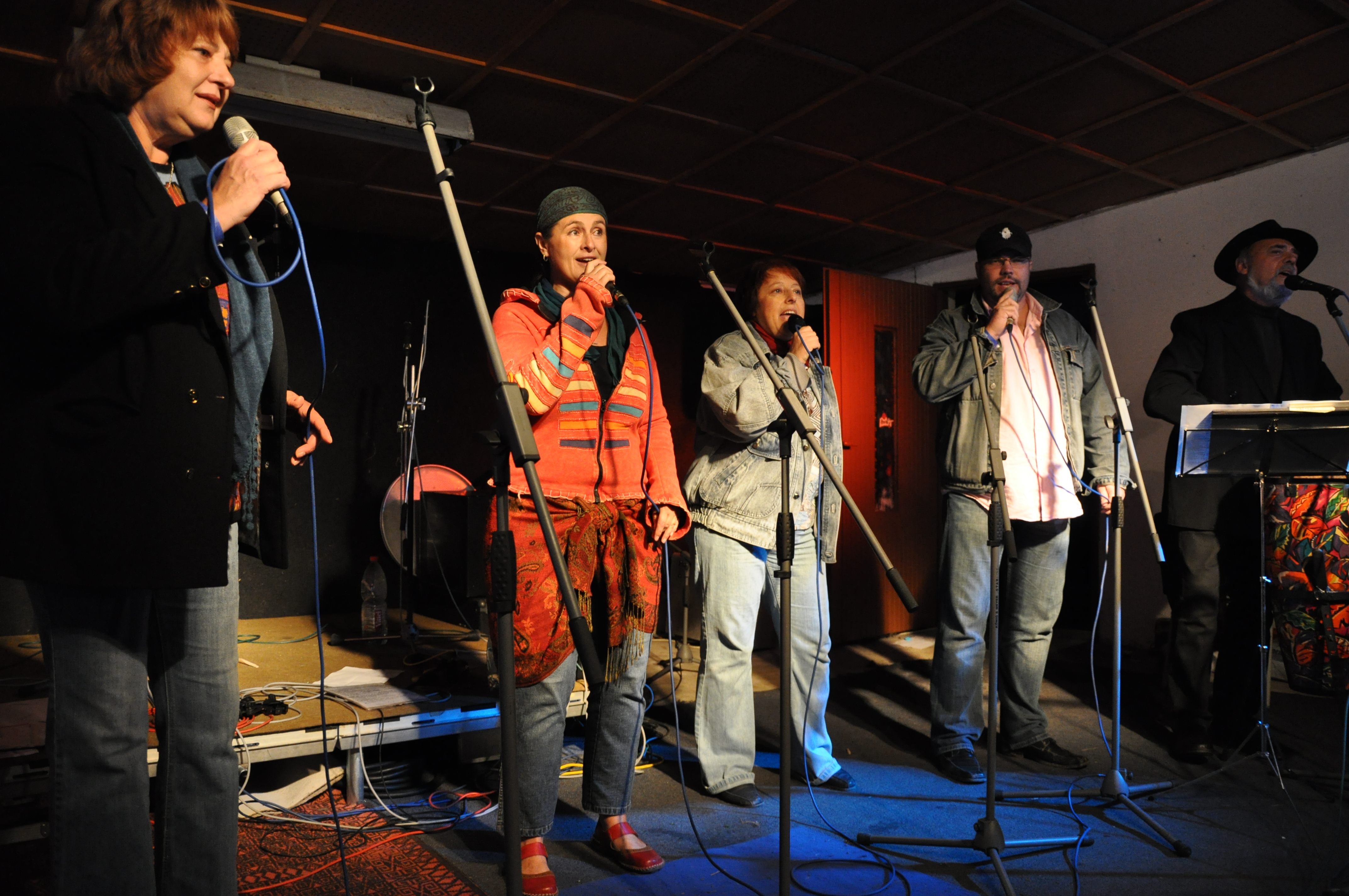 C&K Vocal, festival Otevřeno, Jimramov 2010